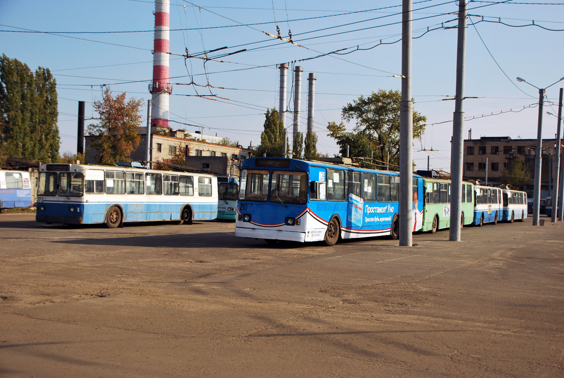 Веер троллейбусного депо №1